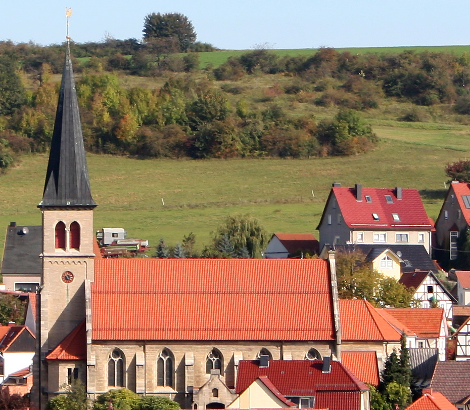 Kirche von Diedorf im Eichsfeld